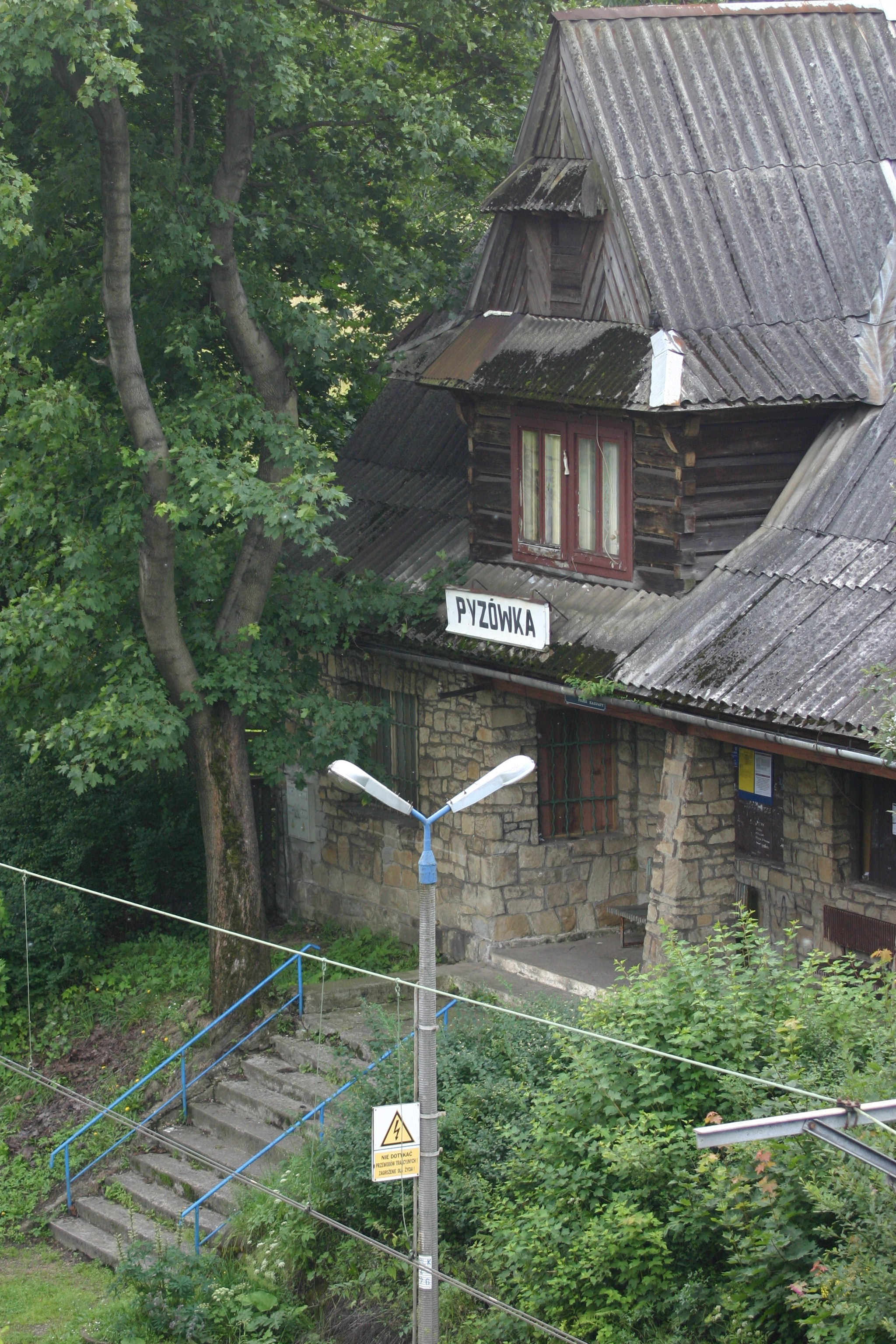 Stacja kolejowa w Pyzówce